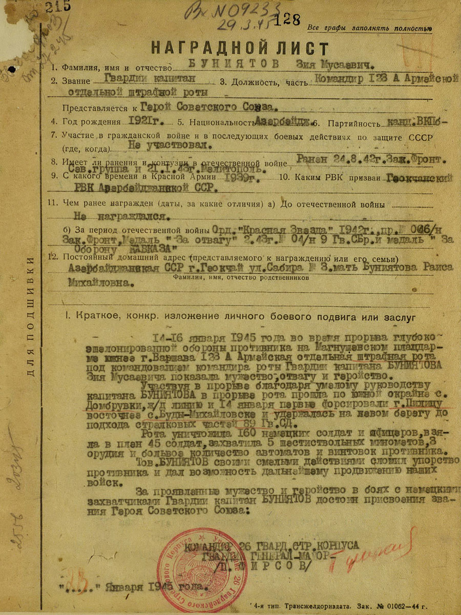 Наградной лист капитана Буниятова, представленного к званию Героя Советского Союза